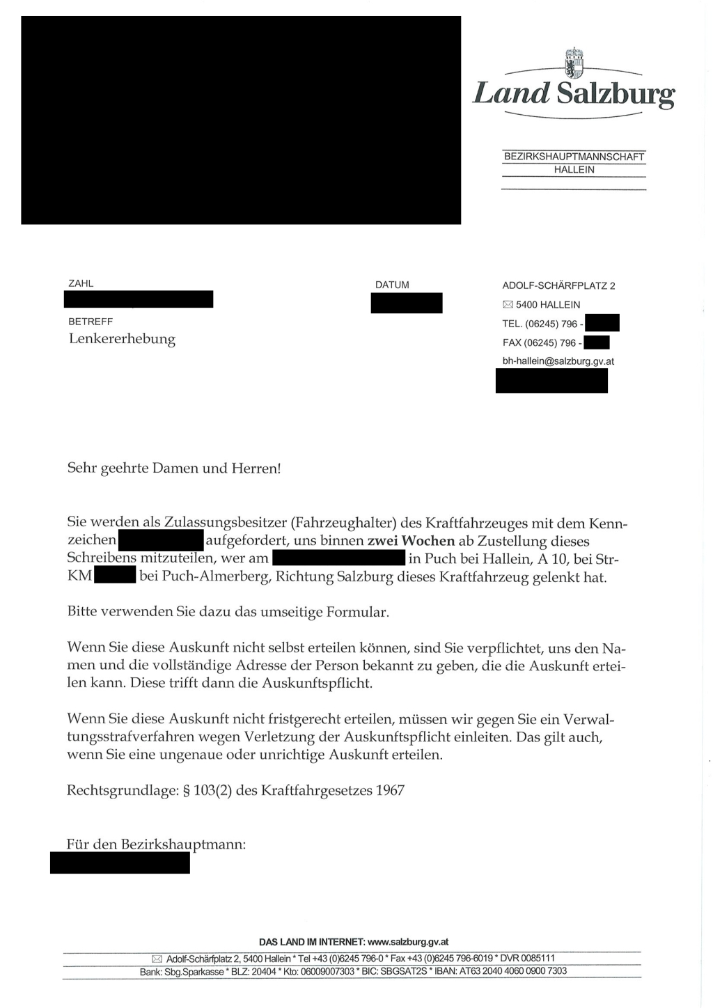 Beispiel einer Lenkererhebung, Vorderseite